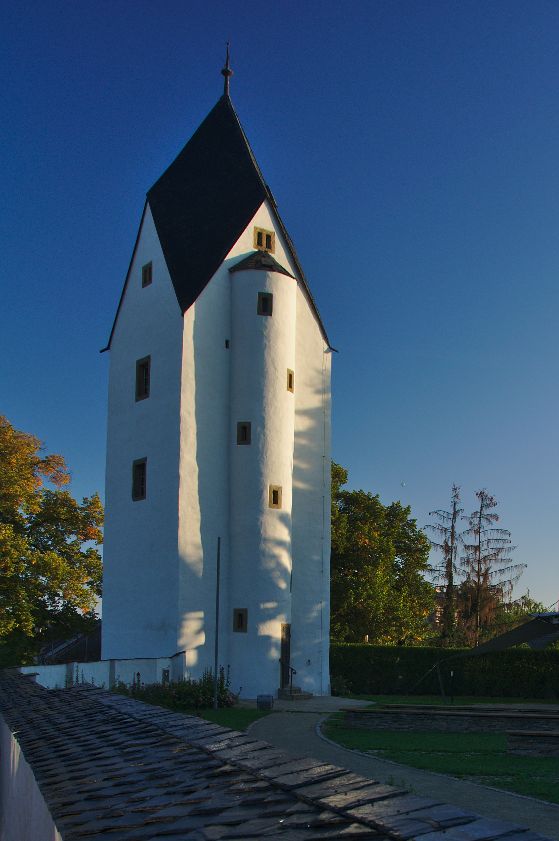 Černá věž, Drahanovice, okres Olomouc